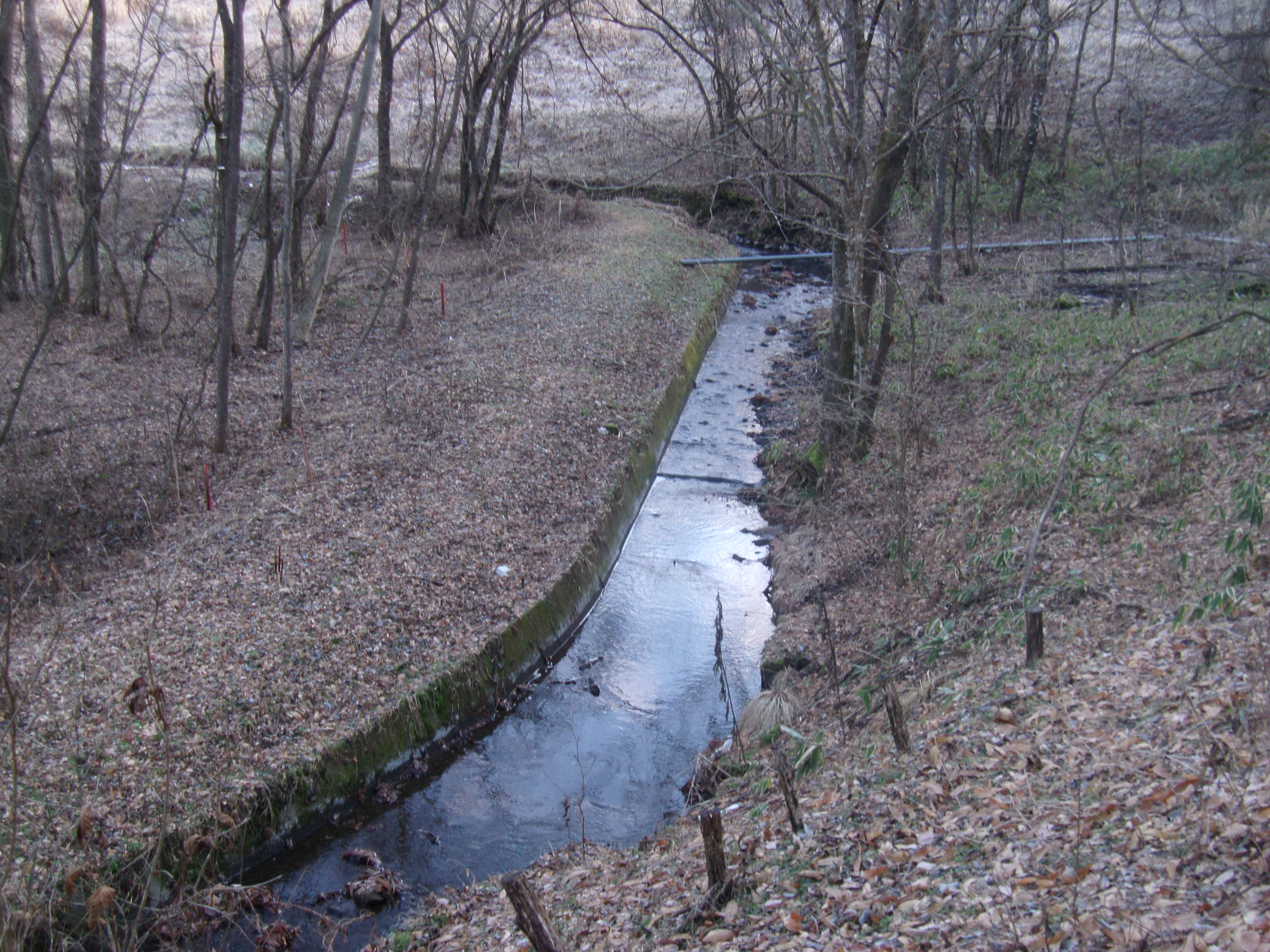 龍神池の排水が合流し水勢が増す滝之湯堰用水